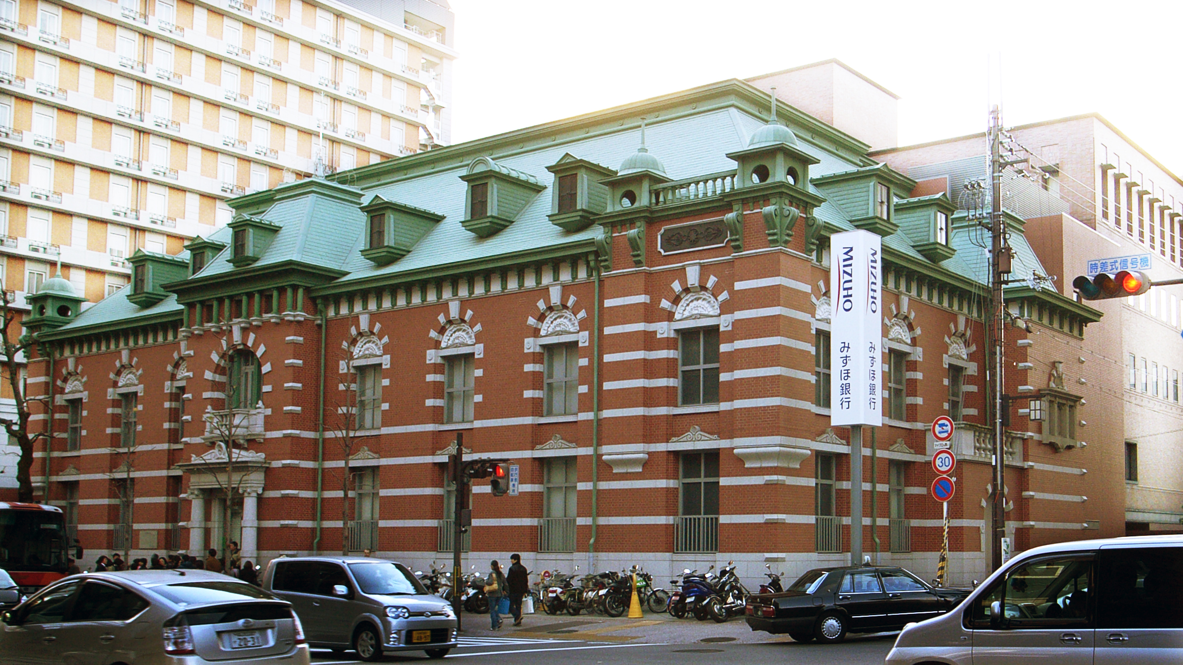 Mizuho Bank Kyoto Chuo Branch in Sanjo Karasuma, Kyoto Japan